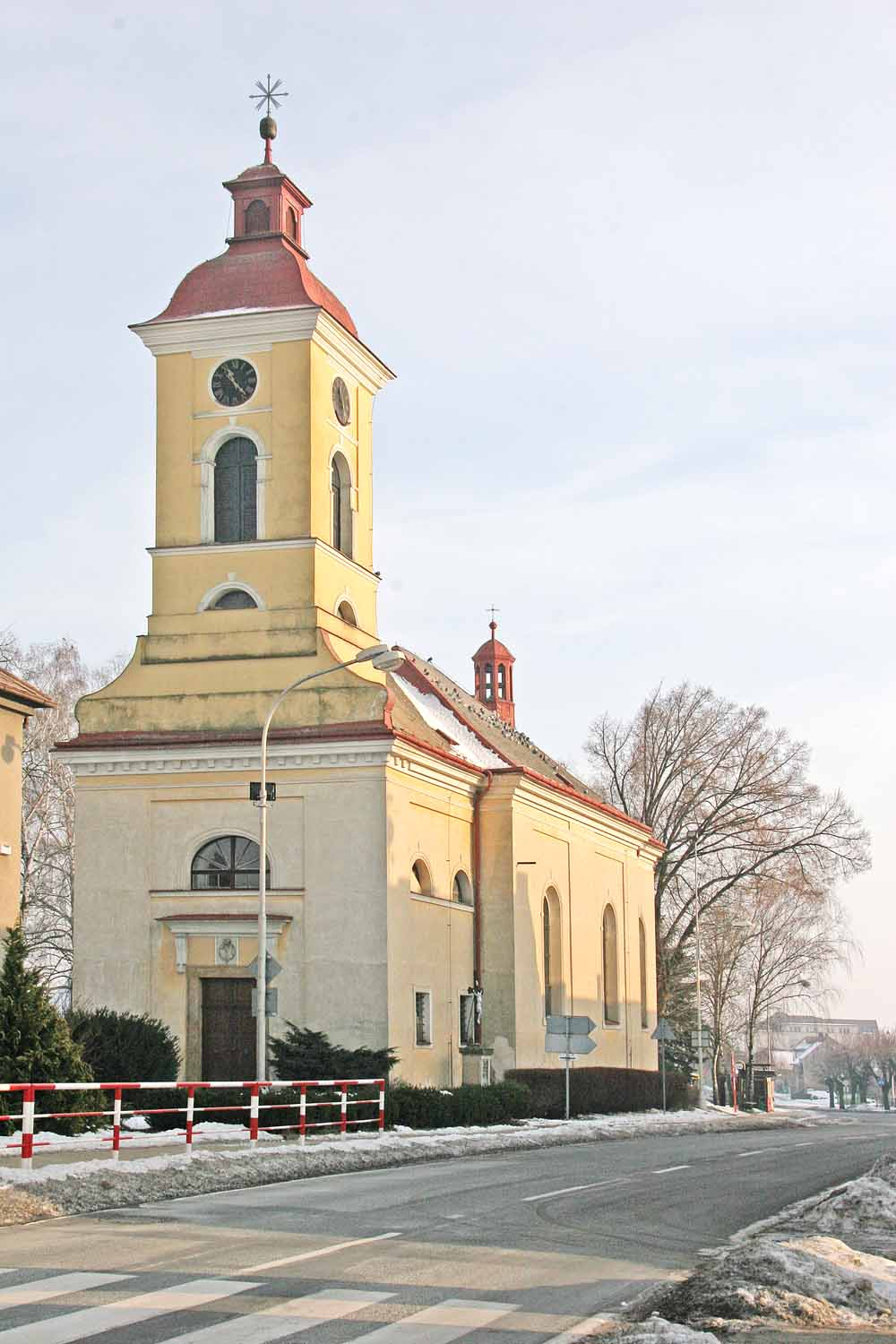 Kostel Svatého Marka ve Stěžerách